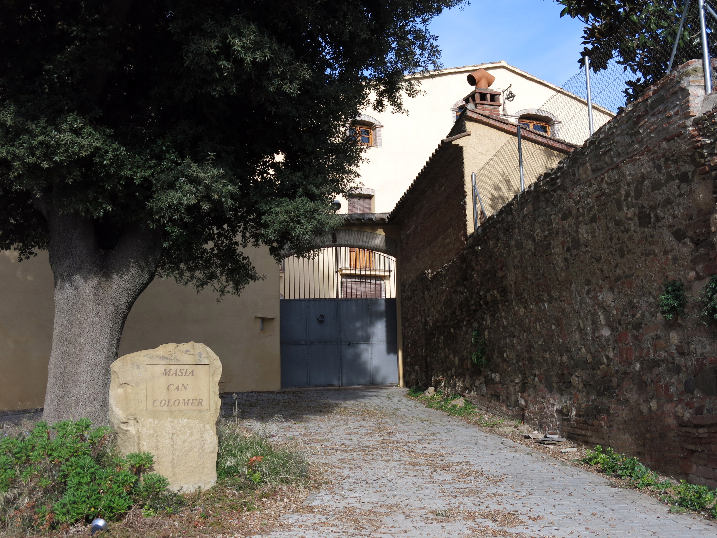 Can Colomer (Terrassa)